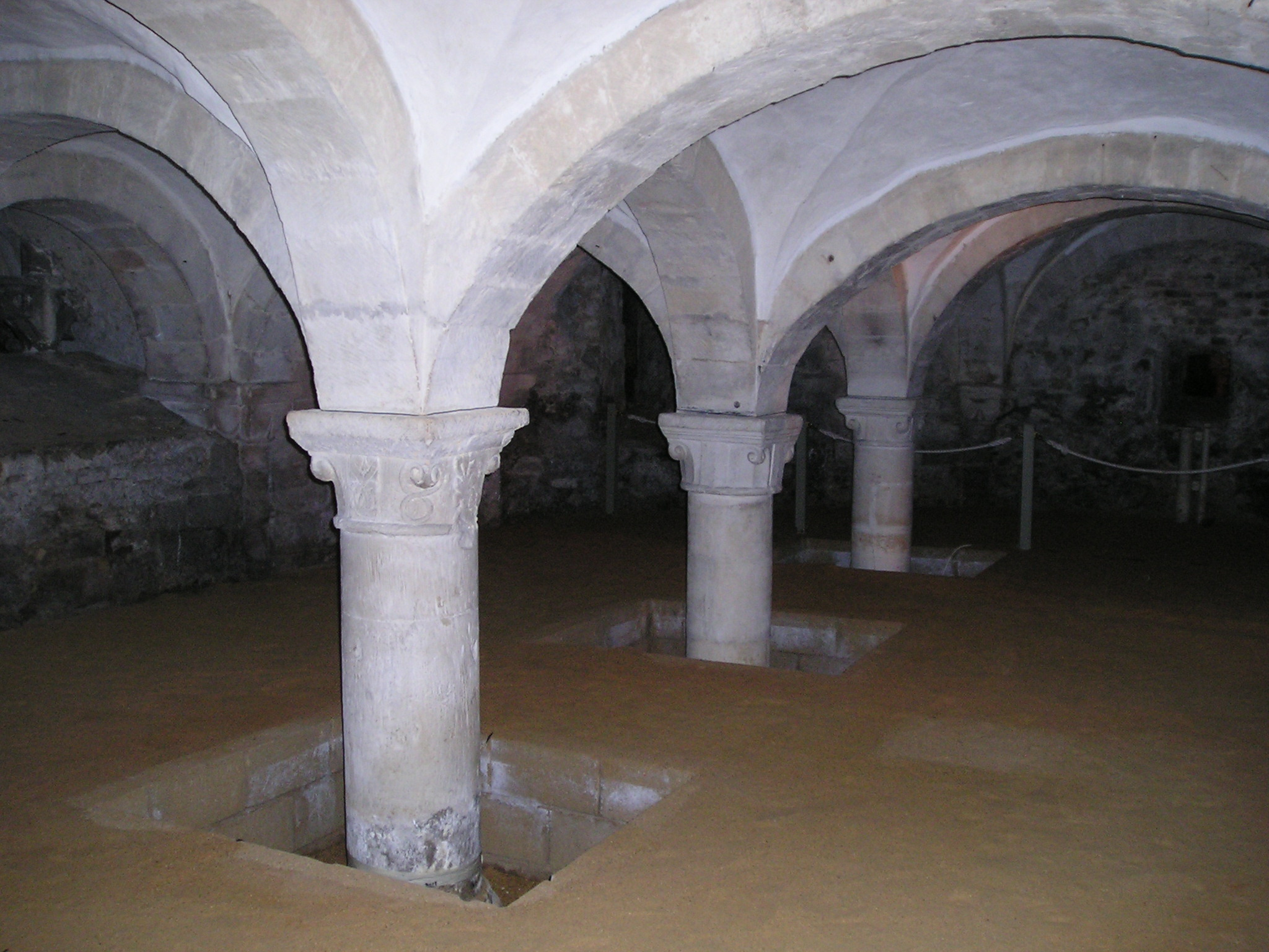 Cripta de la Catedral de Gloucester, en Inglaterra. Pertenece al periodo artístico conocido como "anglosajón", anterior a la conquista del país por los normandos en 1066.